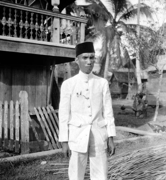 Negatief. Maleisisch dorpshoofd, Pasemah, Zuid-Sumatra